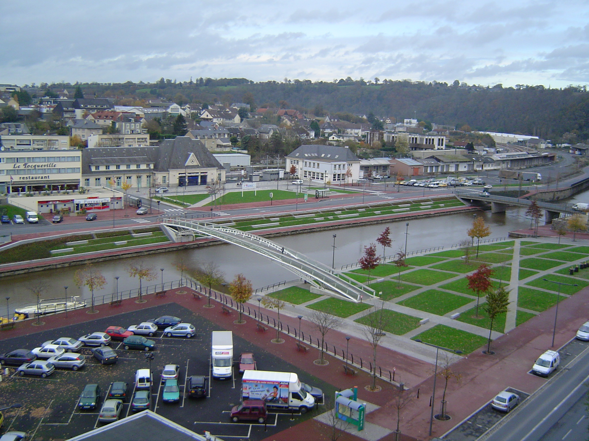 the quai à tangue at Saint-lô, along the Vire